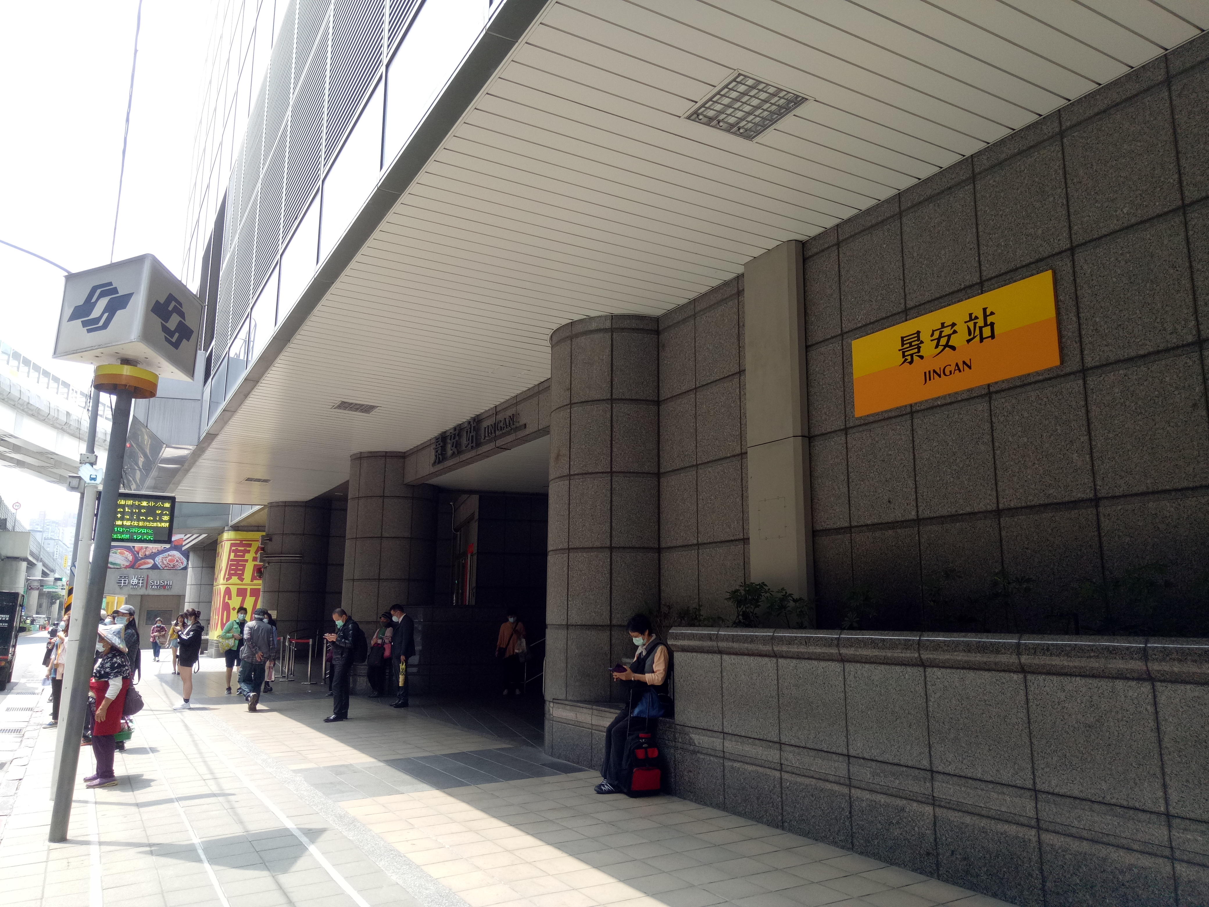 景安站位於共構大樓的出口。該站位於台灣新北市中和區，為台北捷運中和新蘆線（中和線）與環狀線第一階段的交會站。